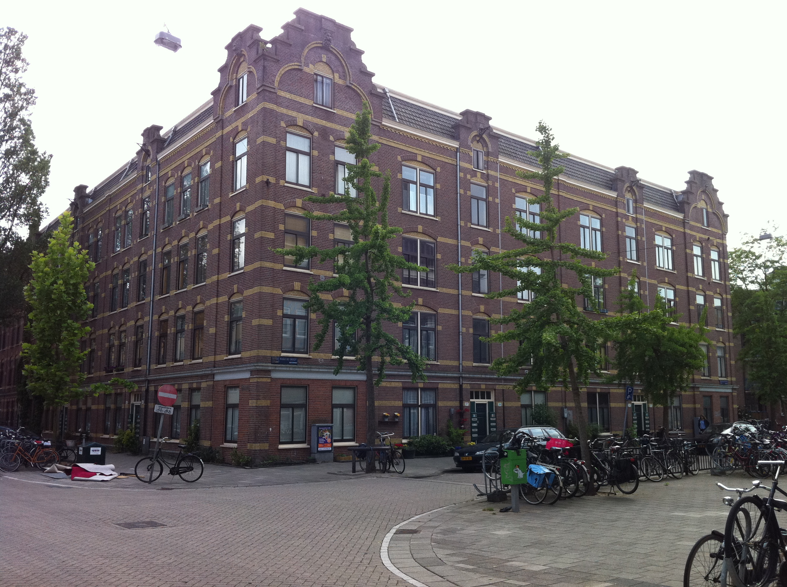 Amsterdam - Hoek Van Houweningenstraat / Derde Hugo de Grootstraat. Gebouwd door Maatschappij voor Volkswoningen; arbeiderswoningen in de Frederik Hendrikbuurt